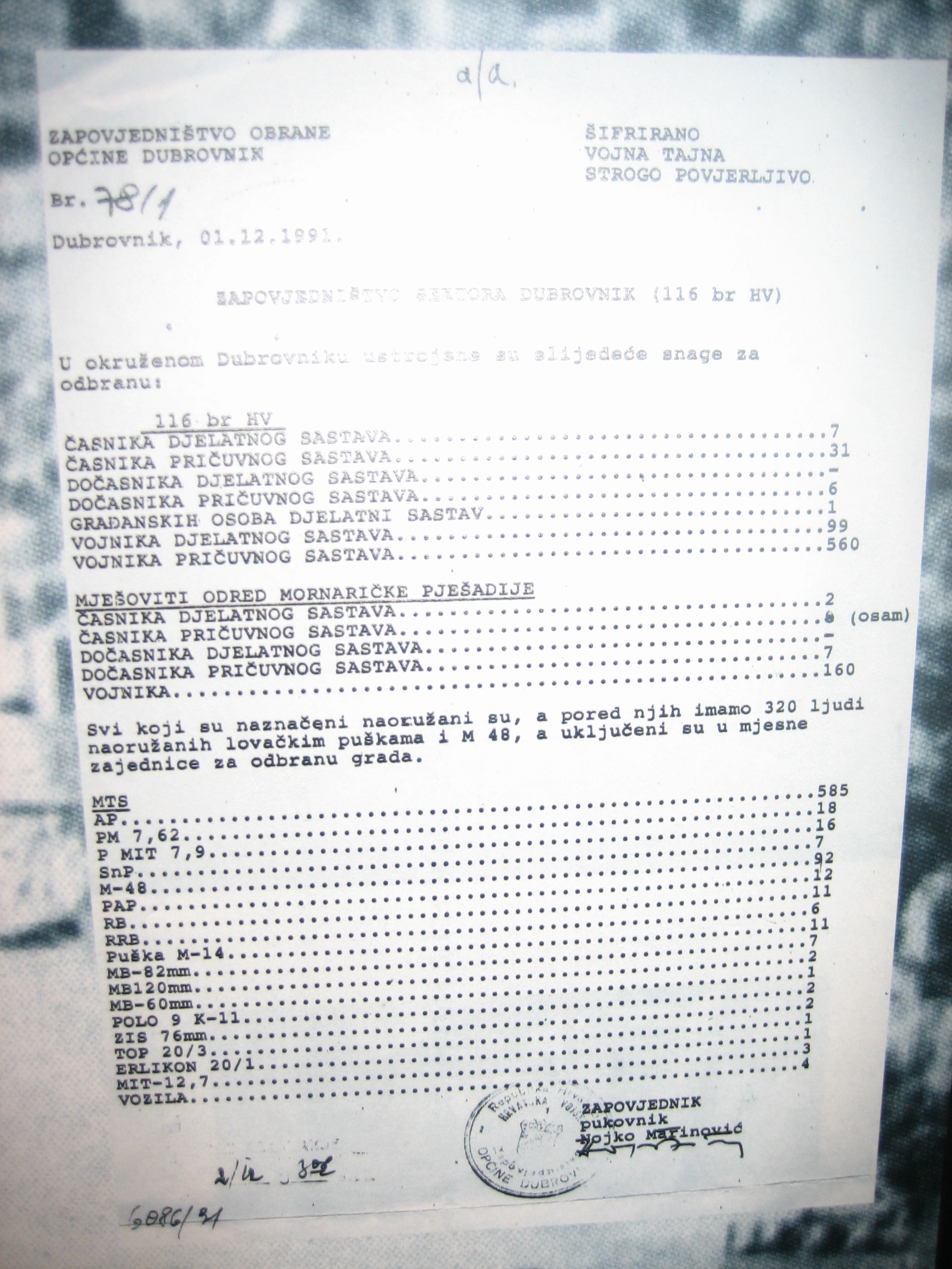 Preslik brojnog stanja obrane Dubrovnika